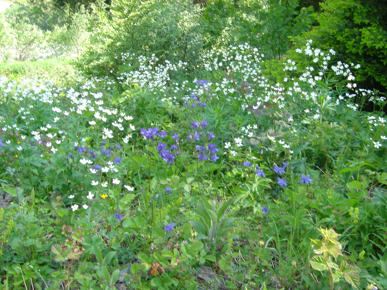 Clump of Ranunculus aconitifolius and Aquilegia vulgaris